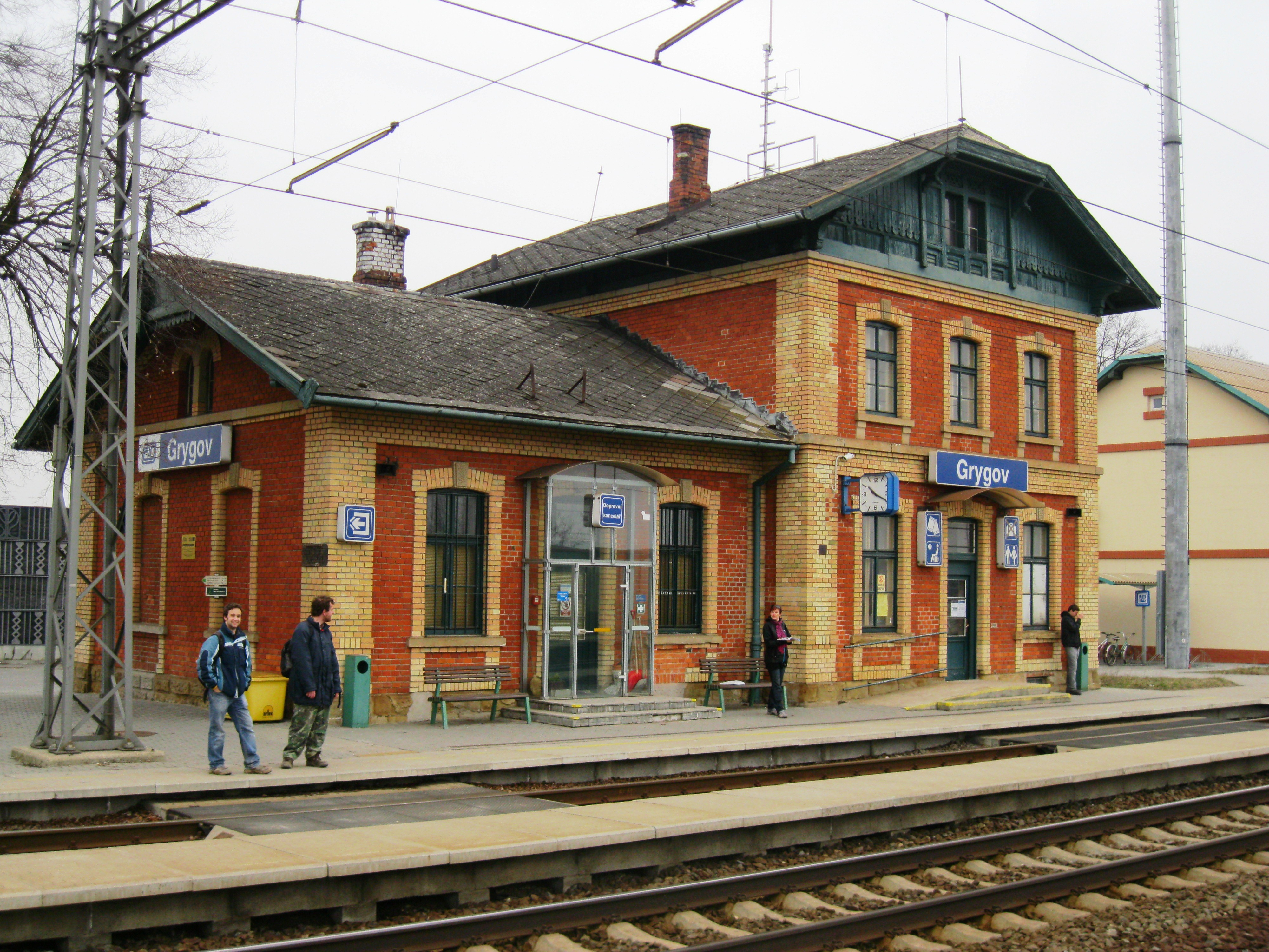 Železniční stanice, z toho jen: výpravní budova čp. 122 a obytný dům čp. 124 (Grygov), Grygov 122